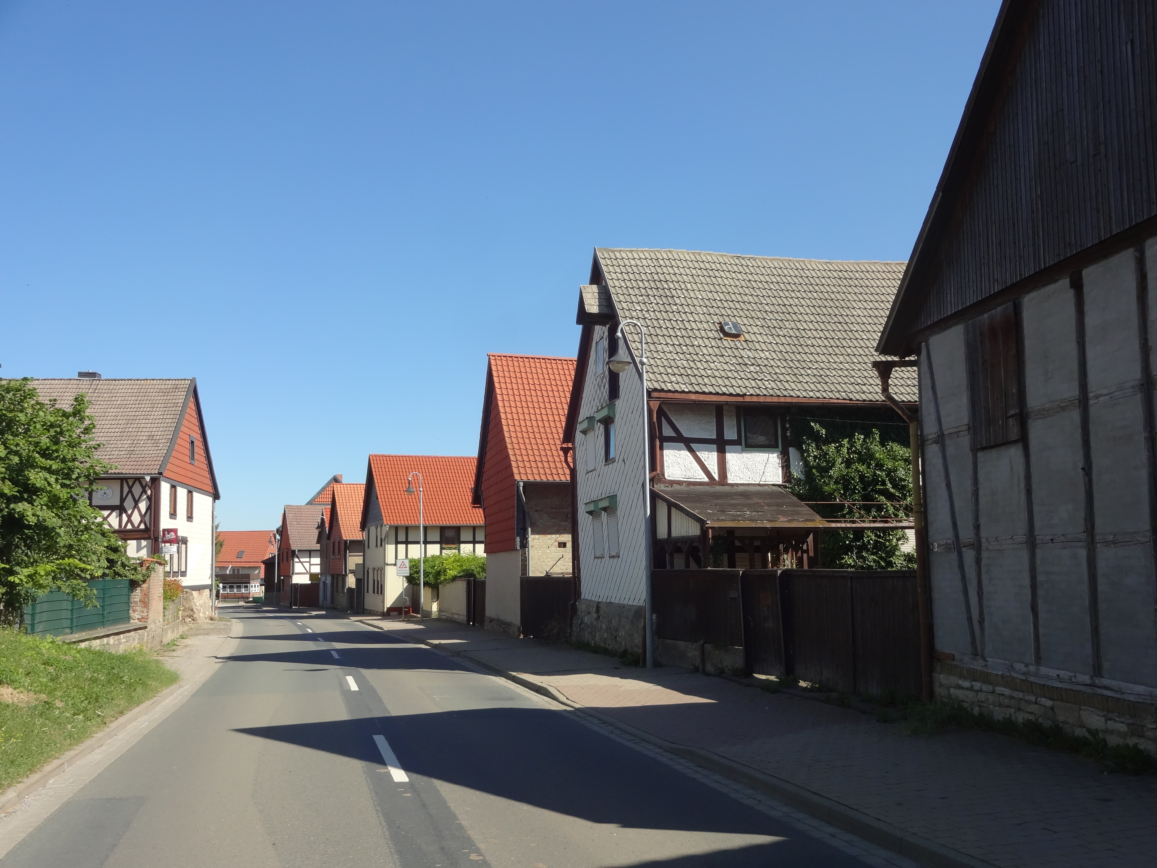 ehemals denkmalgeschützte Häusergruppe Hauptstraße 15, 16, 17, 18, 19, 20 in Langeln, Gemeinde Nordharz